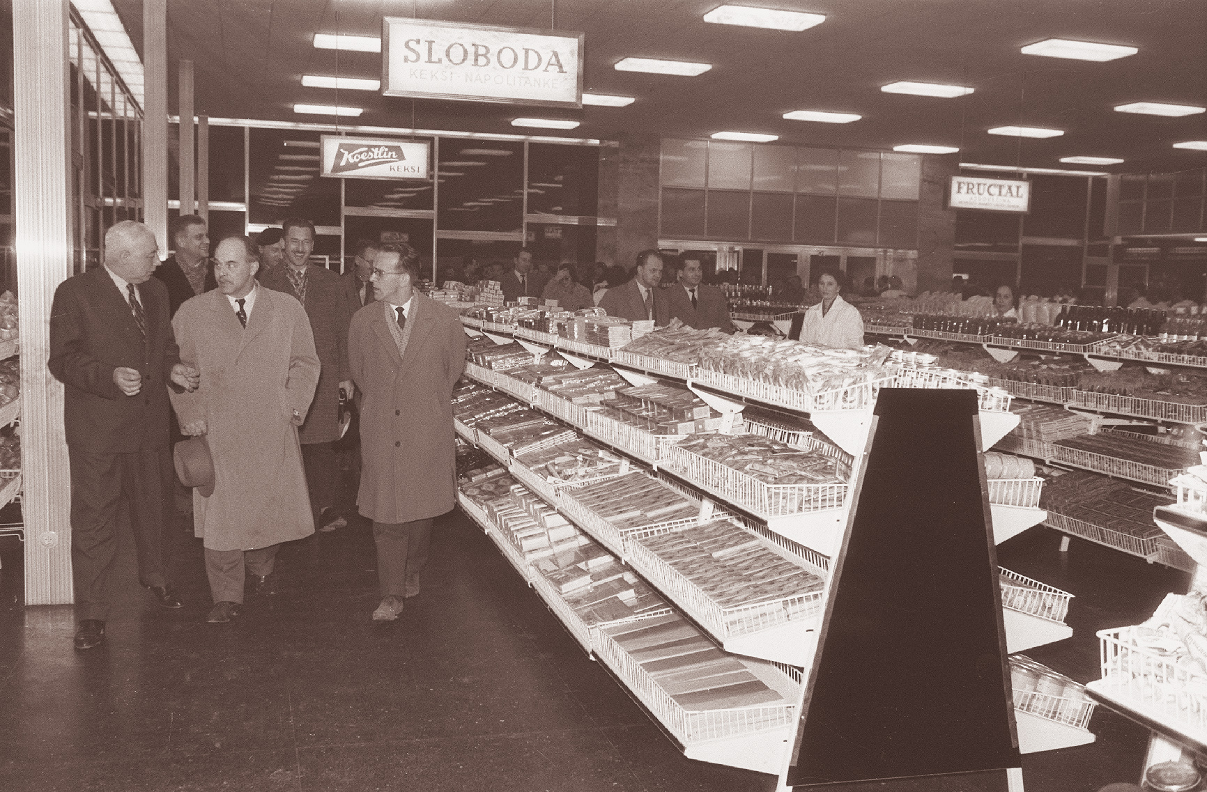 Prvi super-market v središču Ljubljane